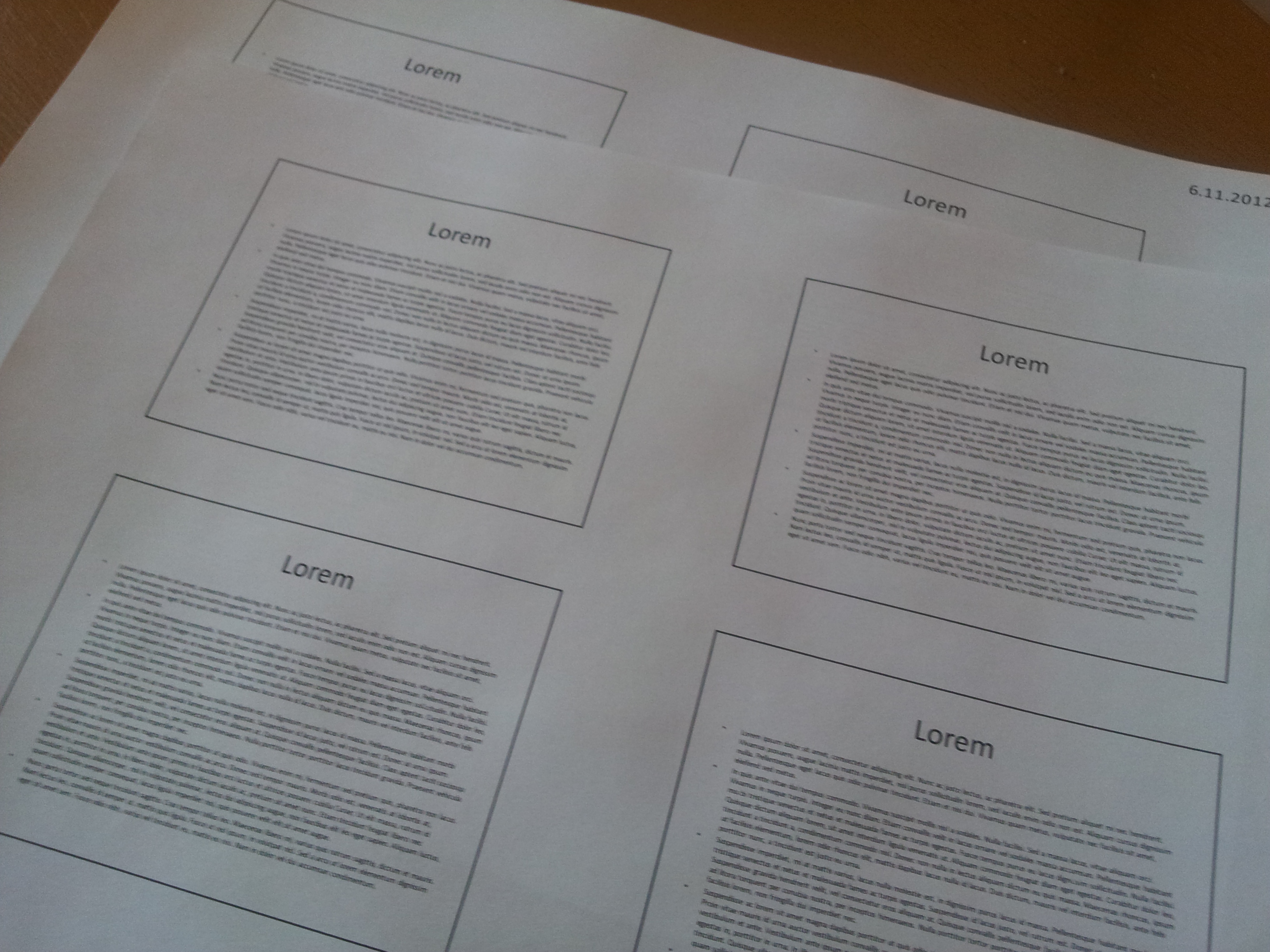 Ukázka slajdumentu